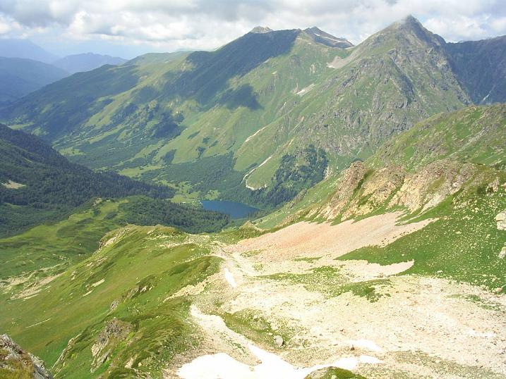 Вид на озеро Кардывач и долину Мзымты с хребта Кутехеку